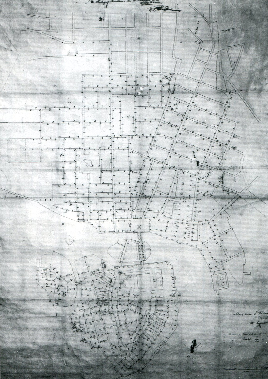 Karta över de 900 gaslyktor i Stockholm, 2 februari 1853